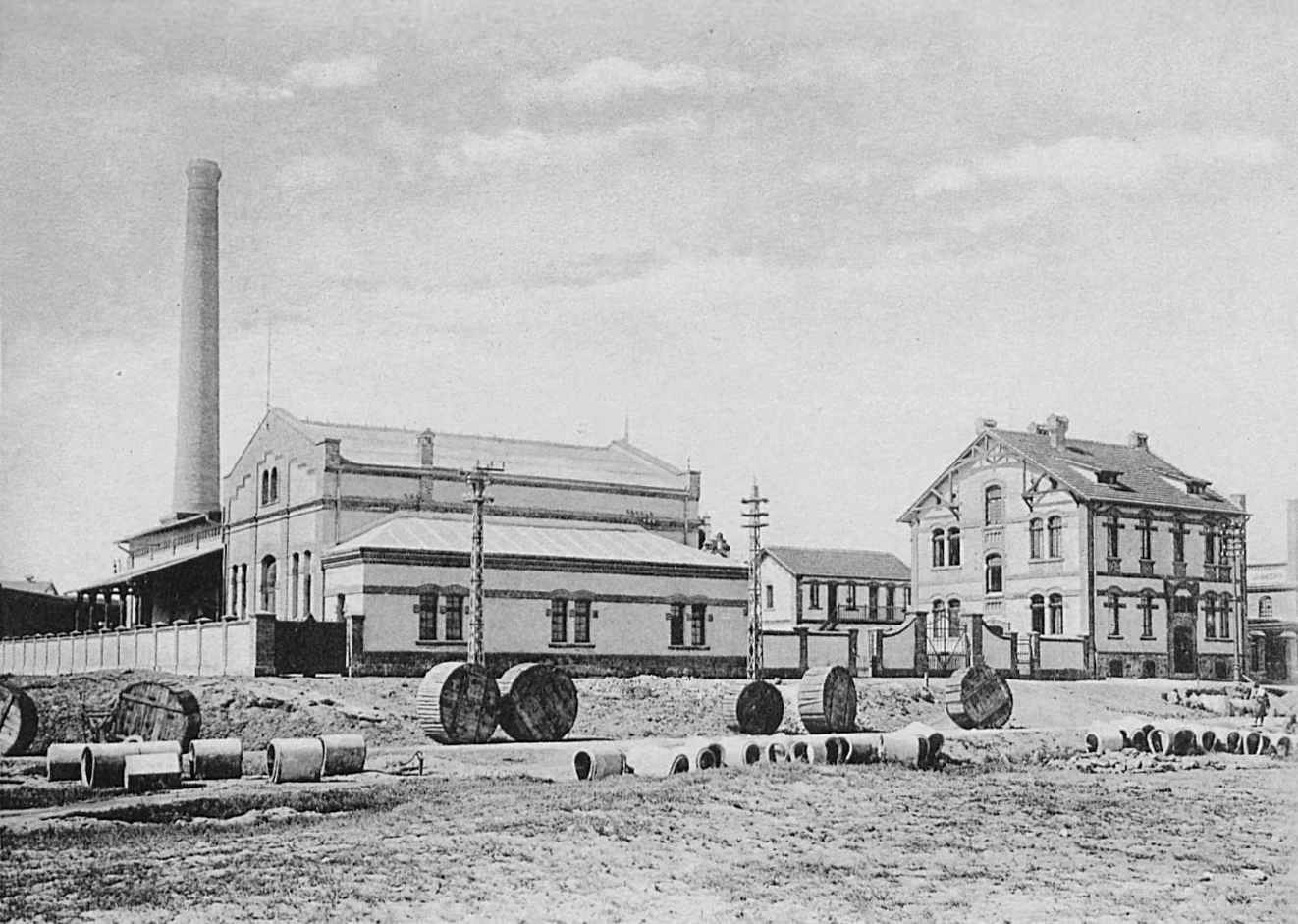 青岛广州路发电厂旧影